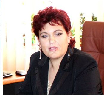 Diana Busoi